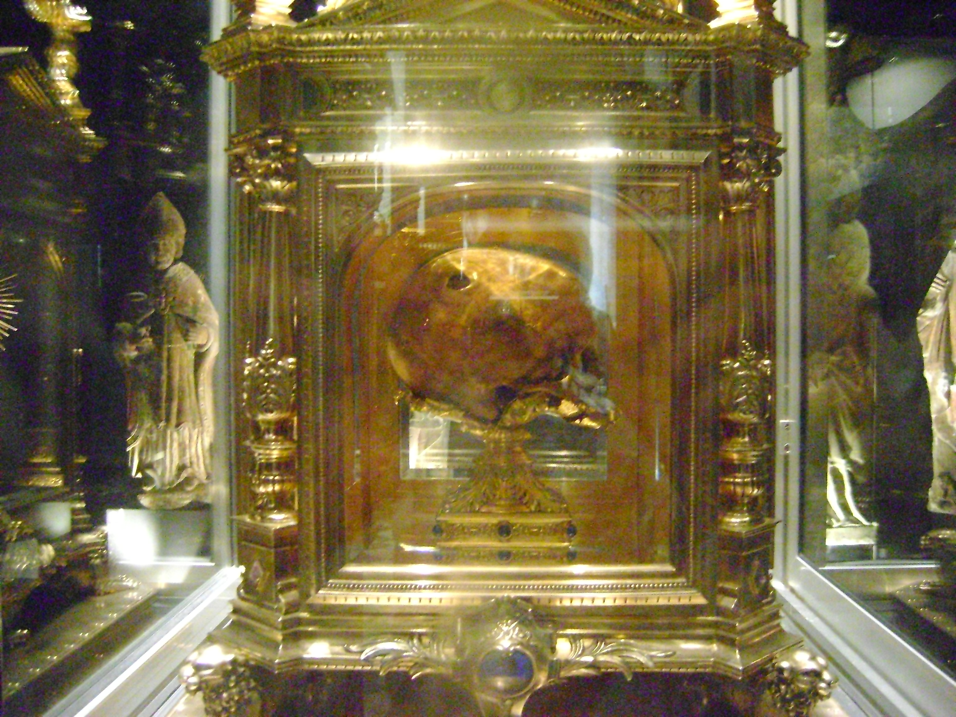 Basilique Saint-Gervais-Saint-Protais d'Avranches. Manche. Le chef de Saint-Aubert fondateur du Mont-Saint-Michel.